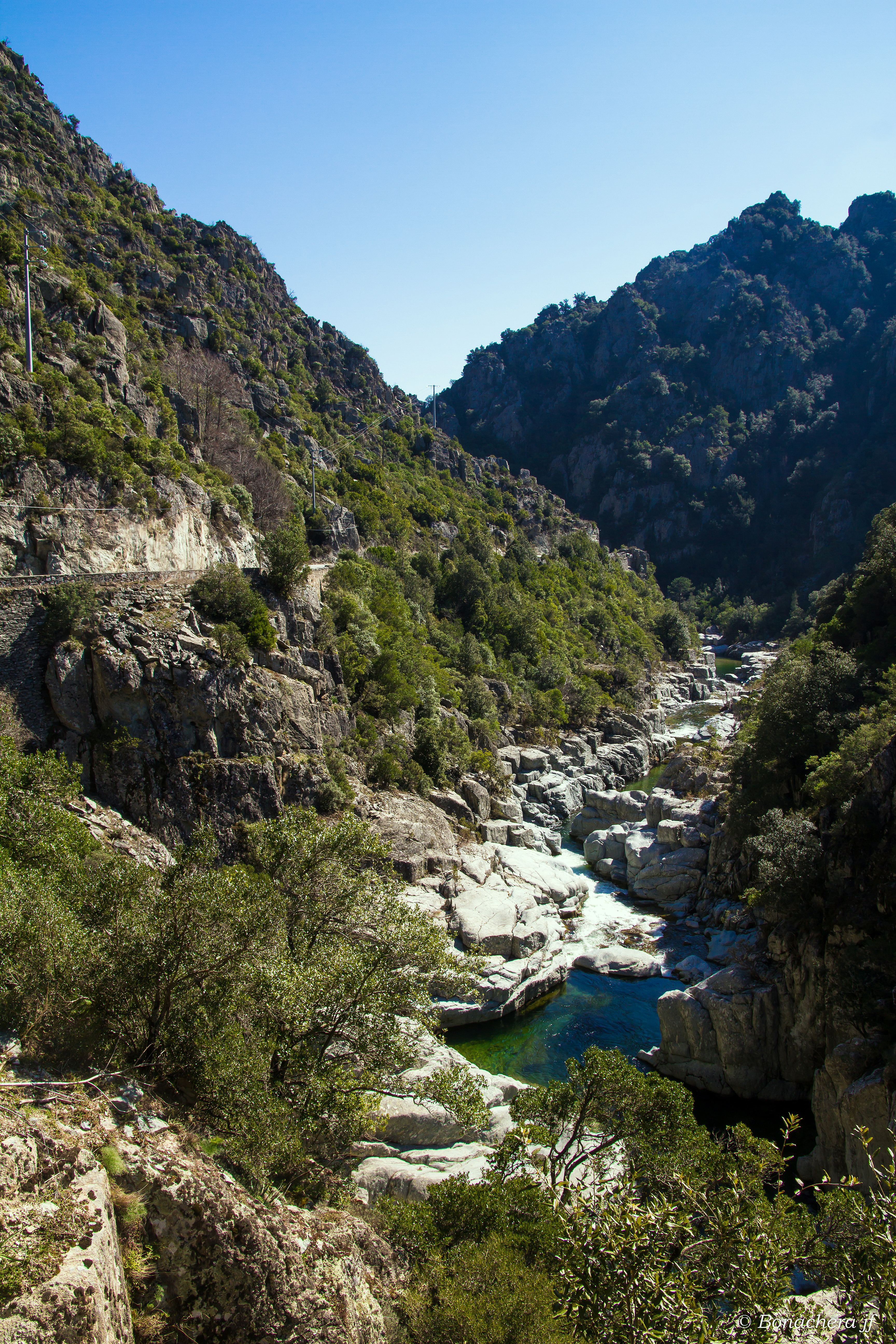 Une vue du défilé de l'inzecca, Ghisoni- Corse, longé par le fleuve Fiumorbu